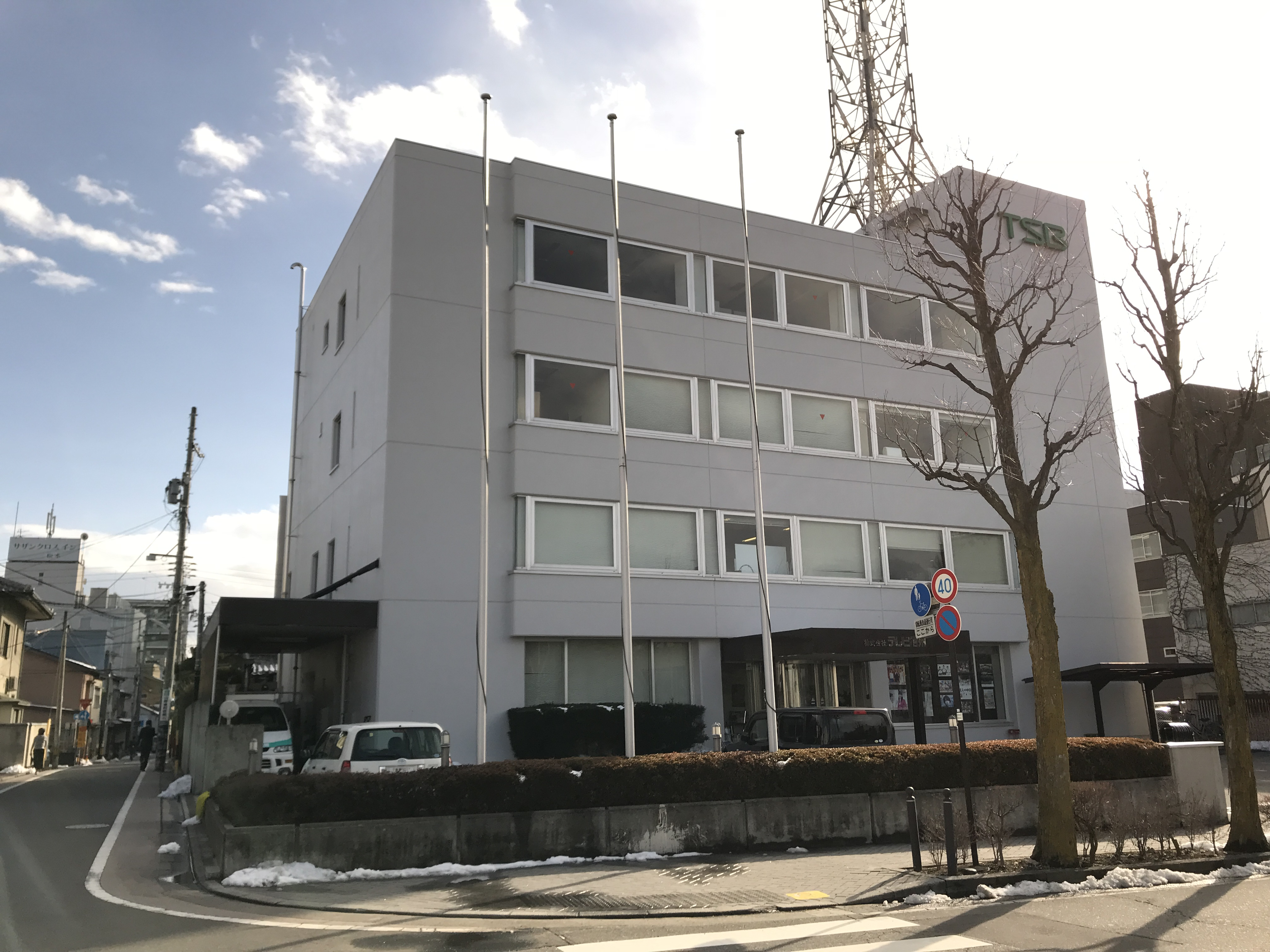 テレビ信州松本支局。